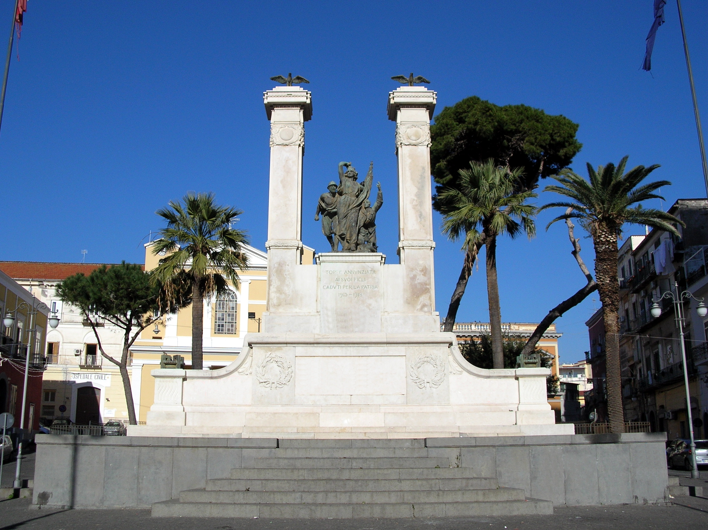 Il monumenti ai caduti di Torre Annunziata